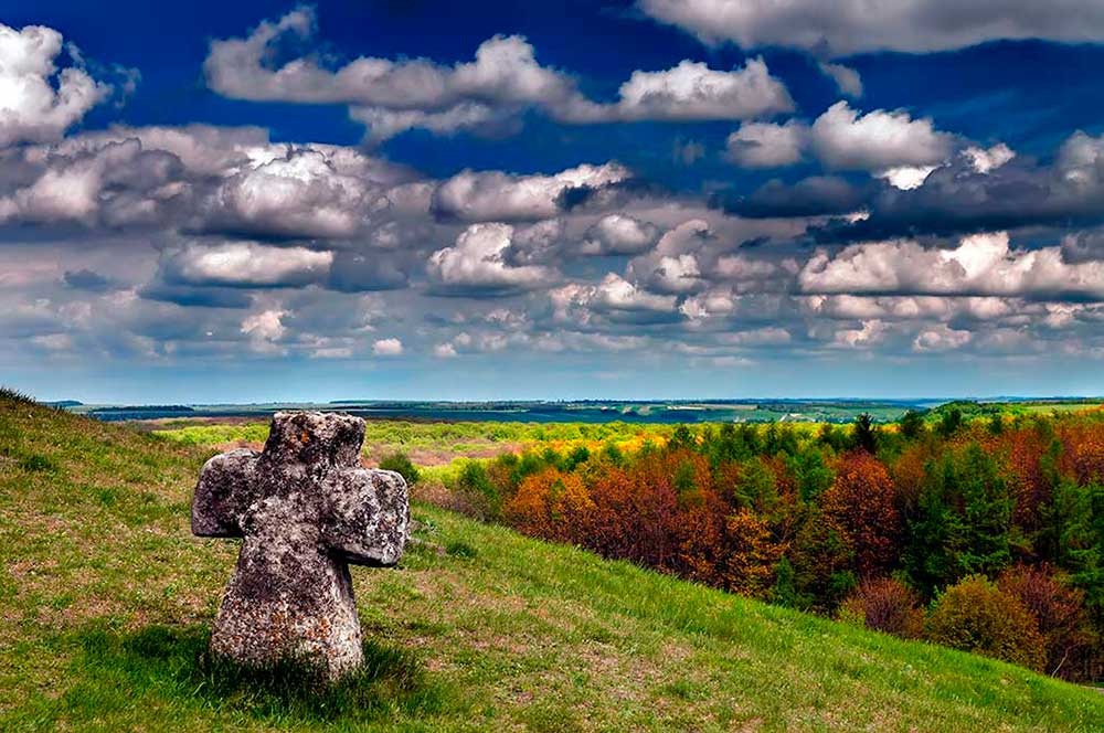 Камьяний хрест у селі Підкамінь